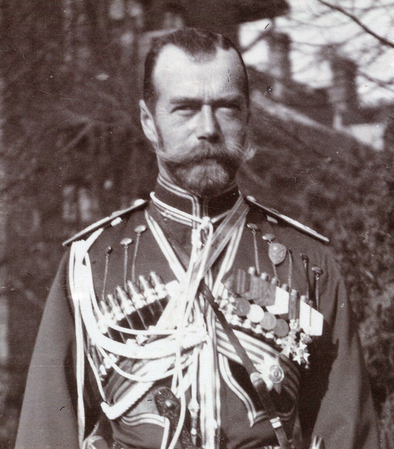 Nicholas II, Tsar of Russia.